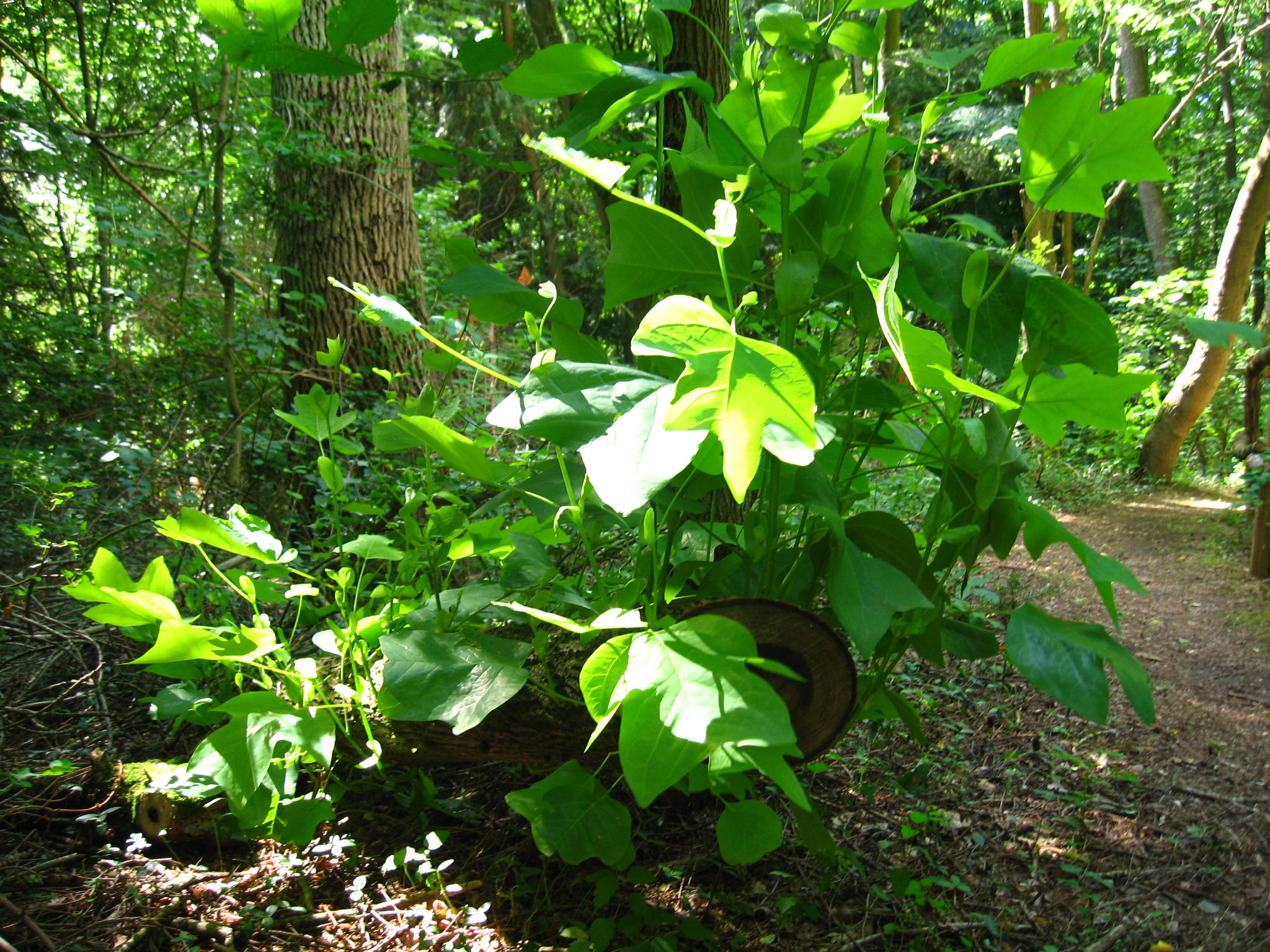 Tulpenbaum